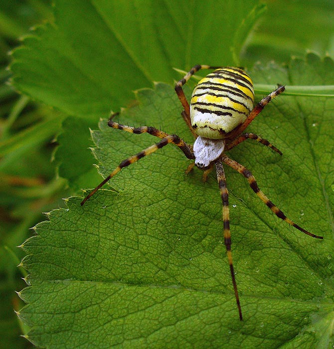 Křižák pruhovaný